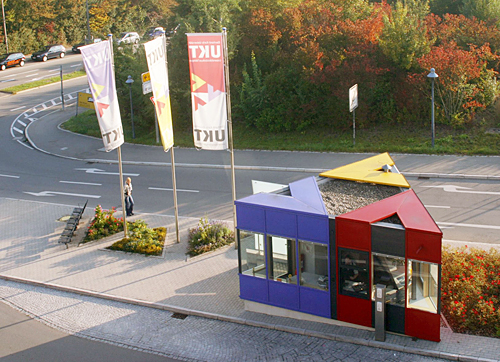 Universitätsklinikum Tübingen Pforte Kliniken Berg